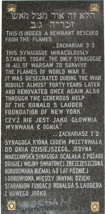 Tablica pamiątowa w synagodze Nożyków. Grafikę wyprostował User:Hiuppo